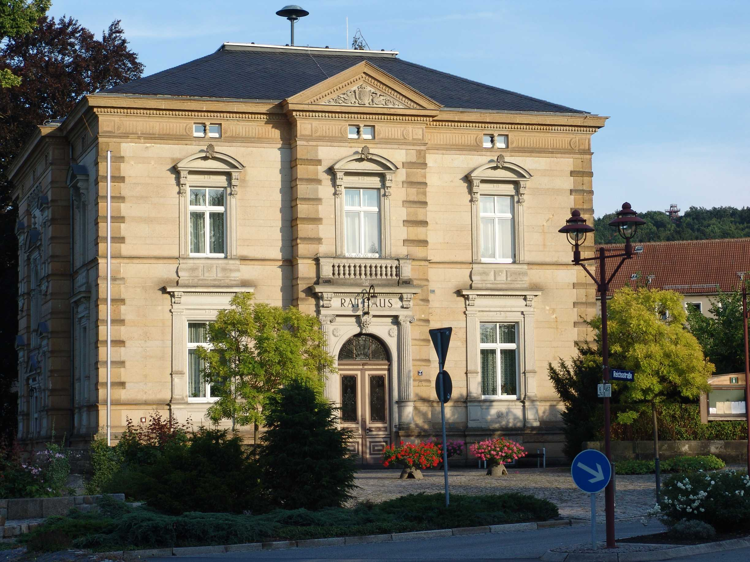 Rathaus von Ebersbach/Sa., Landkreis Görlitz, Sachsen